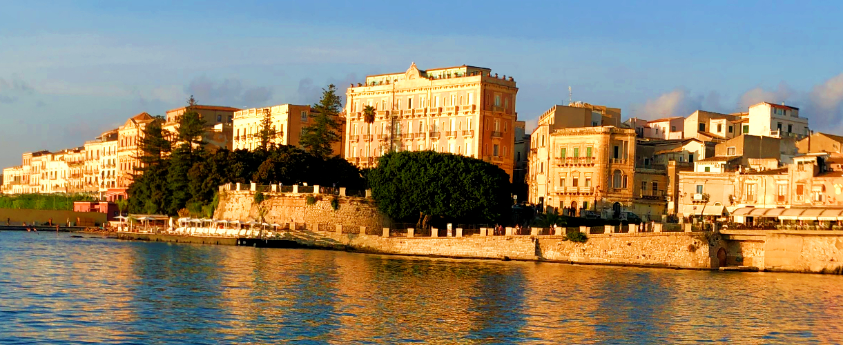 Gli alberi del Foro Italico, la fonte Aretusa vista dall'esterno, l'omonimo forte spagnolo (Forte Aretusa), l'omonima piazza (Largo Aretusa) e lo storico hotel Des Ètrangers